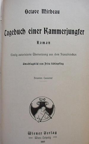 Couverture de Tagebuch einer Kammerjungfer, d'Octave Mirbeau (1848-1917)